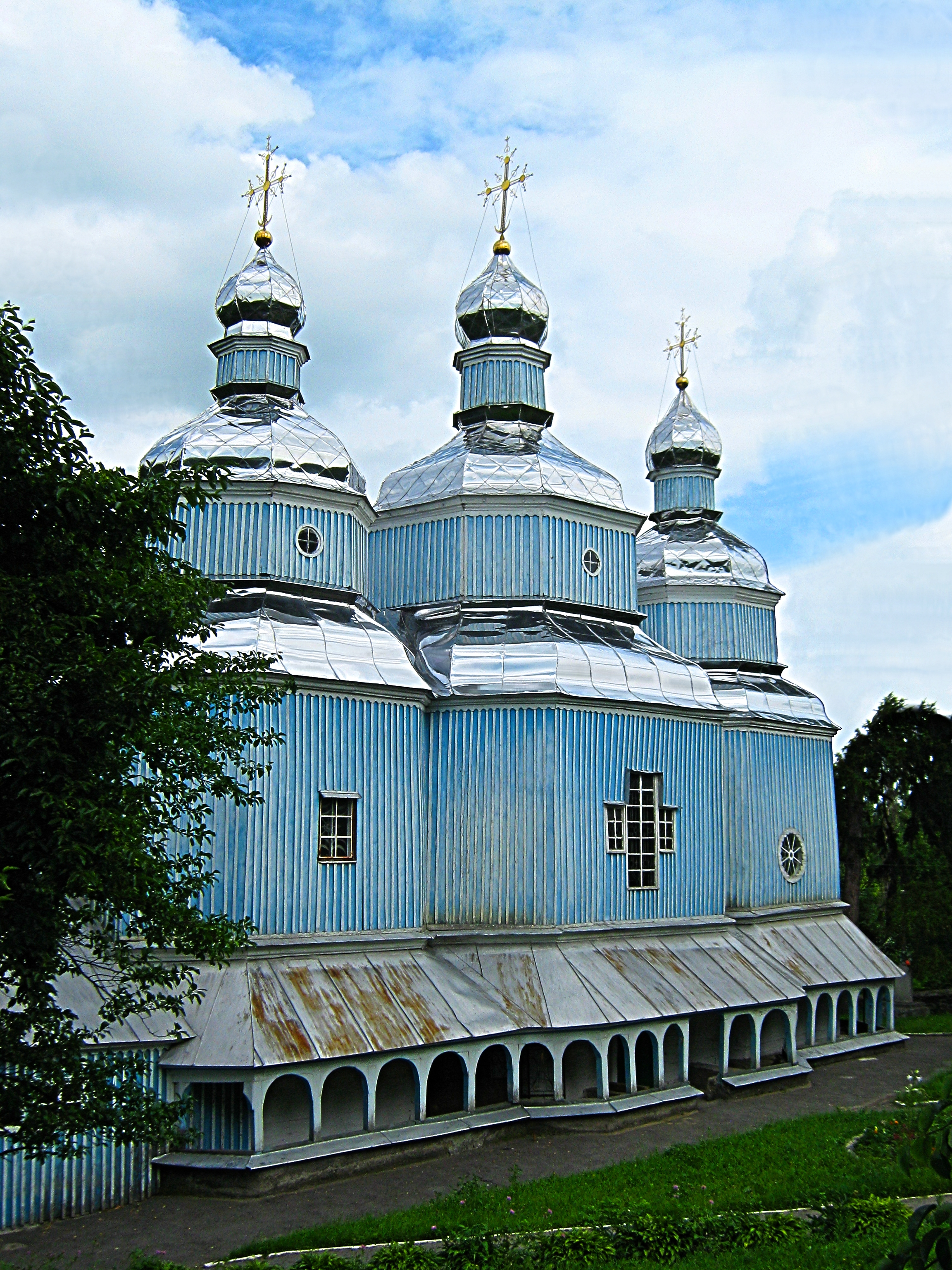 Українська церква. Миколаївська ц-ва 1746 року